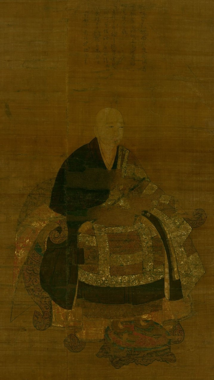 南渓瑞聞の頂相。